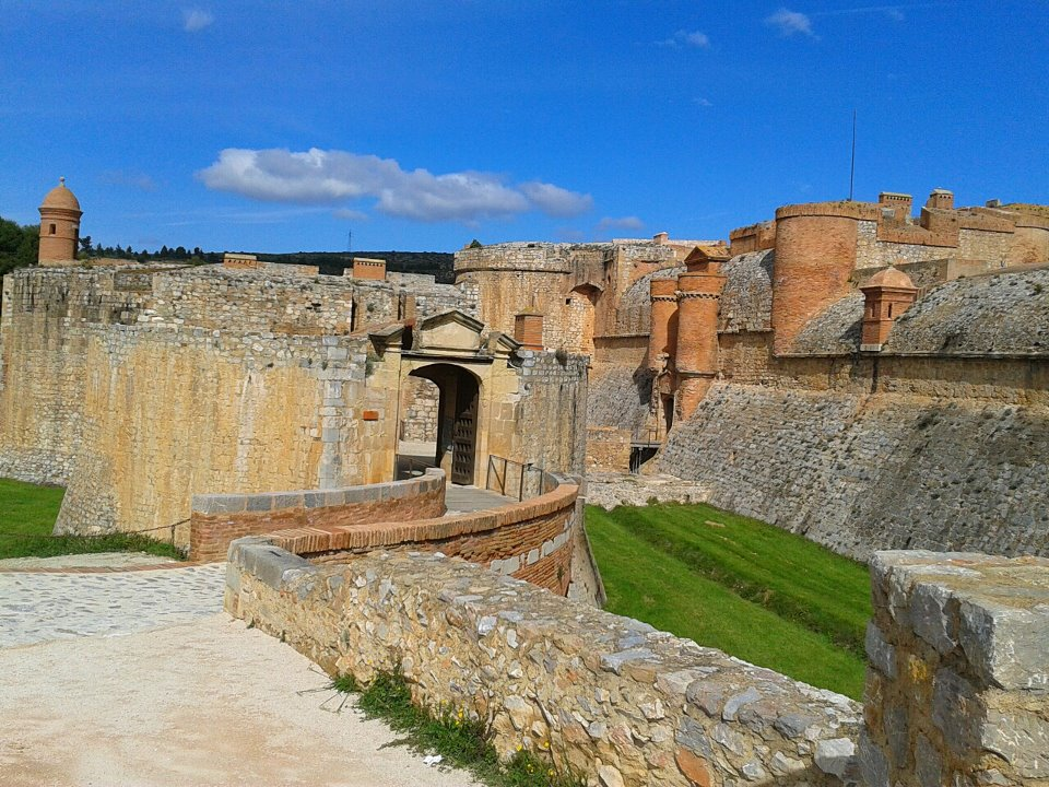 Castell de Salses .